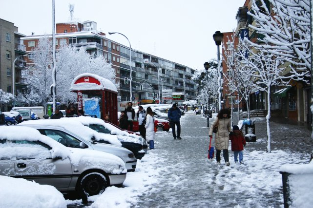 Fotografía de Coslada un día de nieve Datos de la fotografía Autor: Year of the dragon Día: Miércoles 23 de Febrero del 2005. Cámara: Canon EOS-300D Retoque fotográfico: The Gimp Licencia: GNU FDL Notas: La imagen se realizó el día de la nevada del 2005 en Madrid. Categoría:España (imagen)